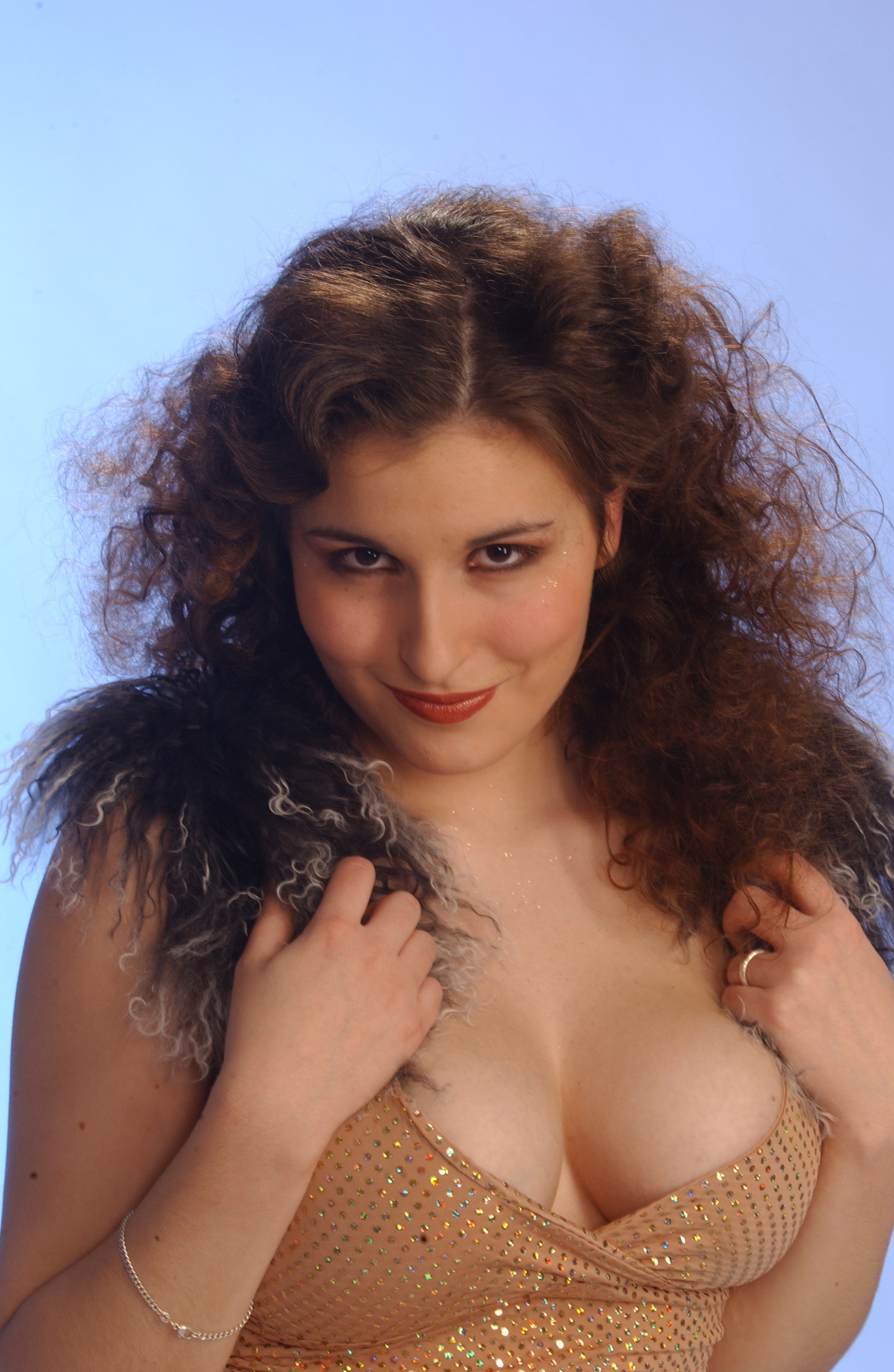 Erste Promoversuche